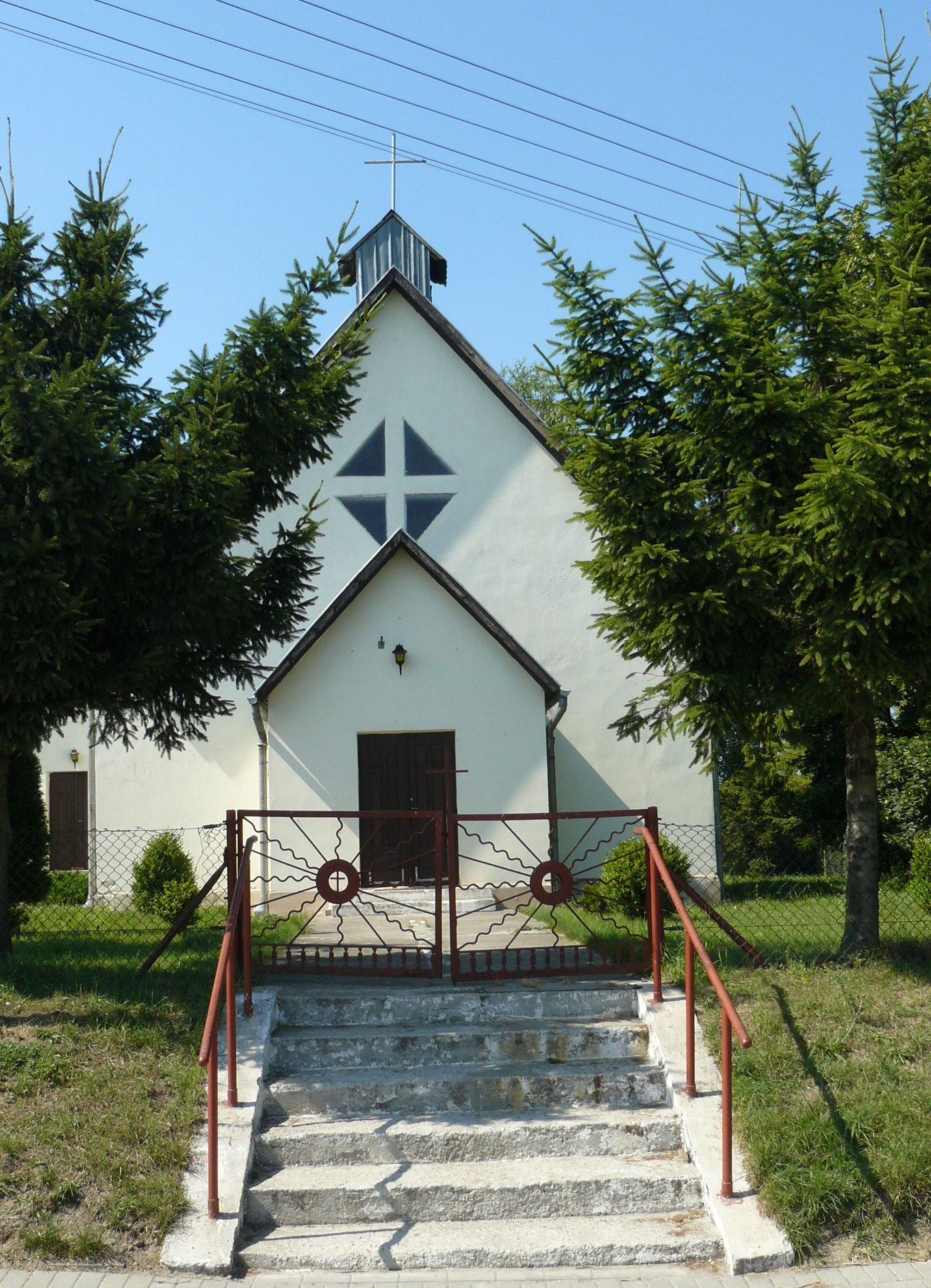 Kościół p.w. Matki Boskiej Pocieszenia w Dębinie w gm. Stare Czarnowo.